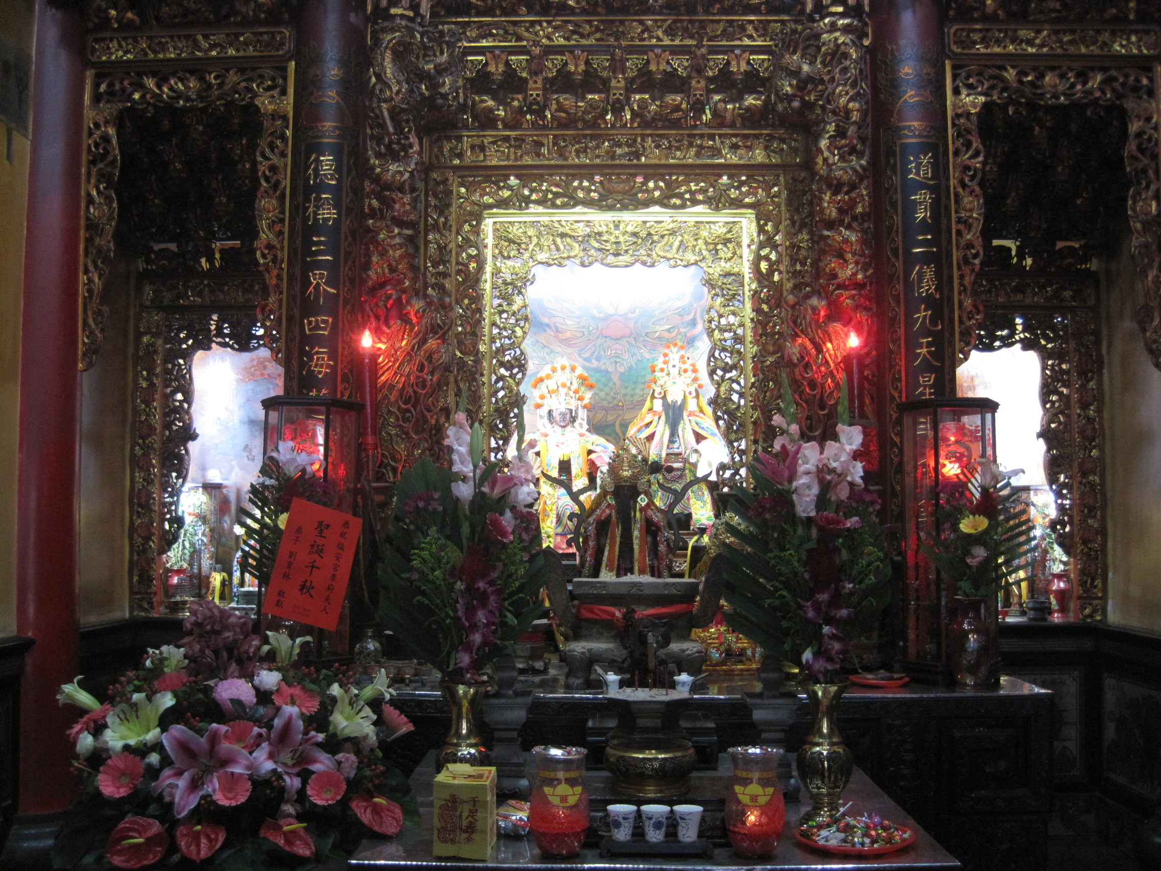 二府口福安宮內部